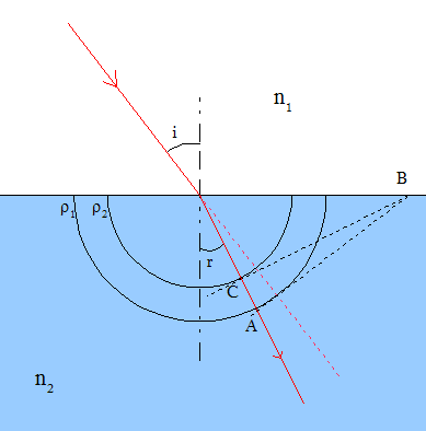 Schéma construction de Huygens pour la réfraction (schéma personnel) Catégorie:Schéma de physique